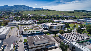 Ansicht des Hauptverwaltungsgebäudes AUMA Riester GmbH & Co. KG in Müllheim.